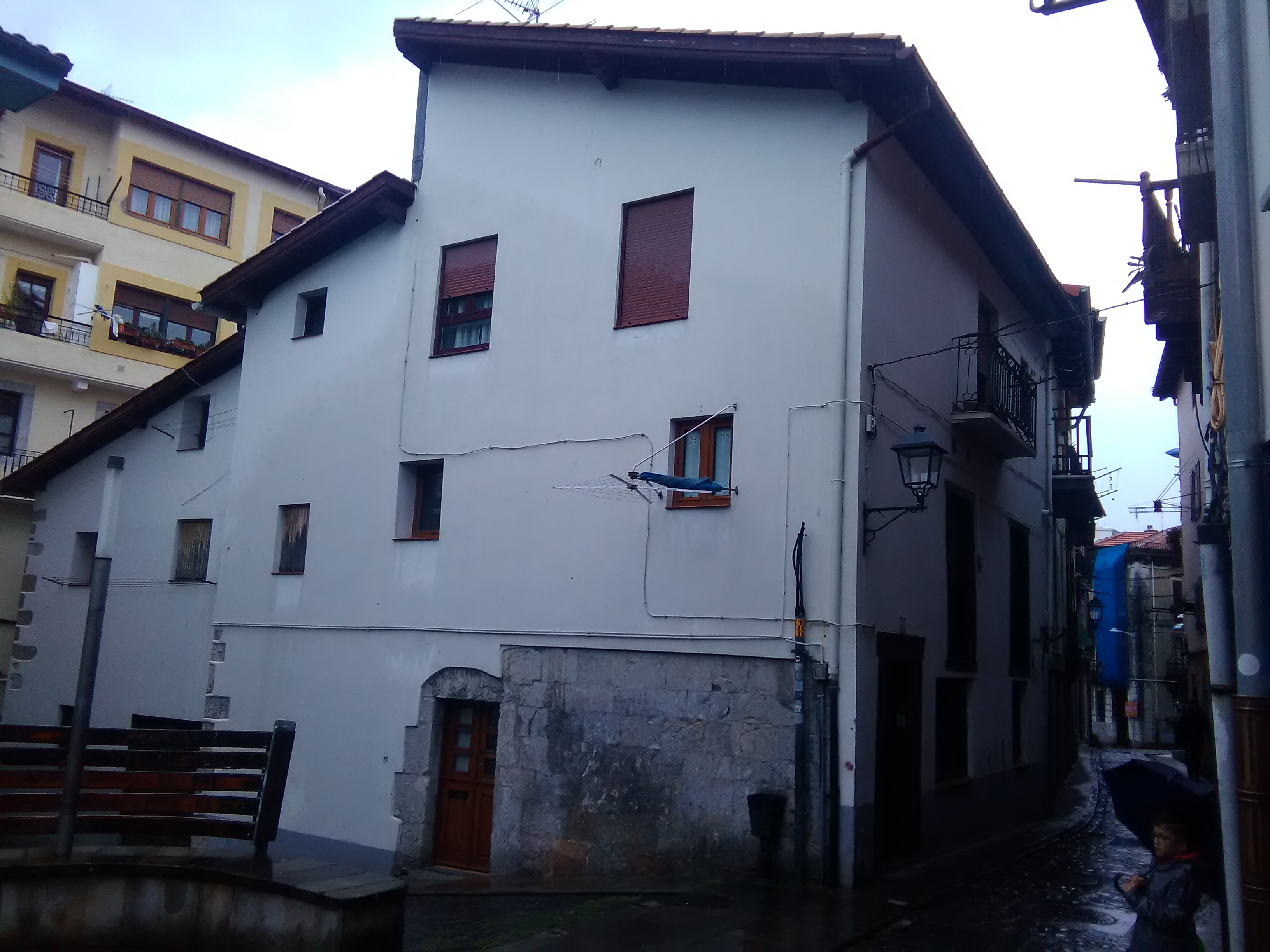 Casa-tienda en Beaskokalea (Lekeitio, España), adquirida por el "americano" Donato Uberuaga a principios del s. XX.